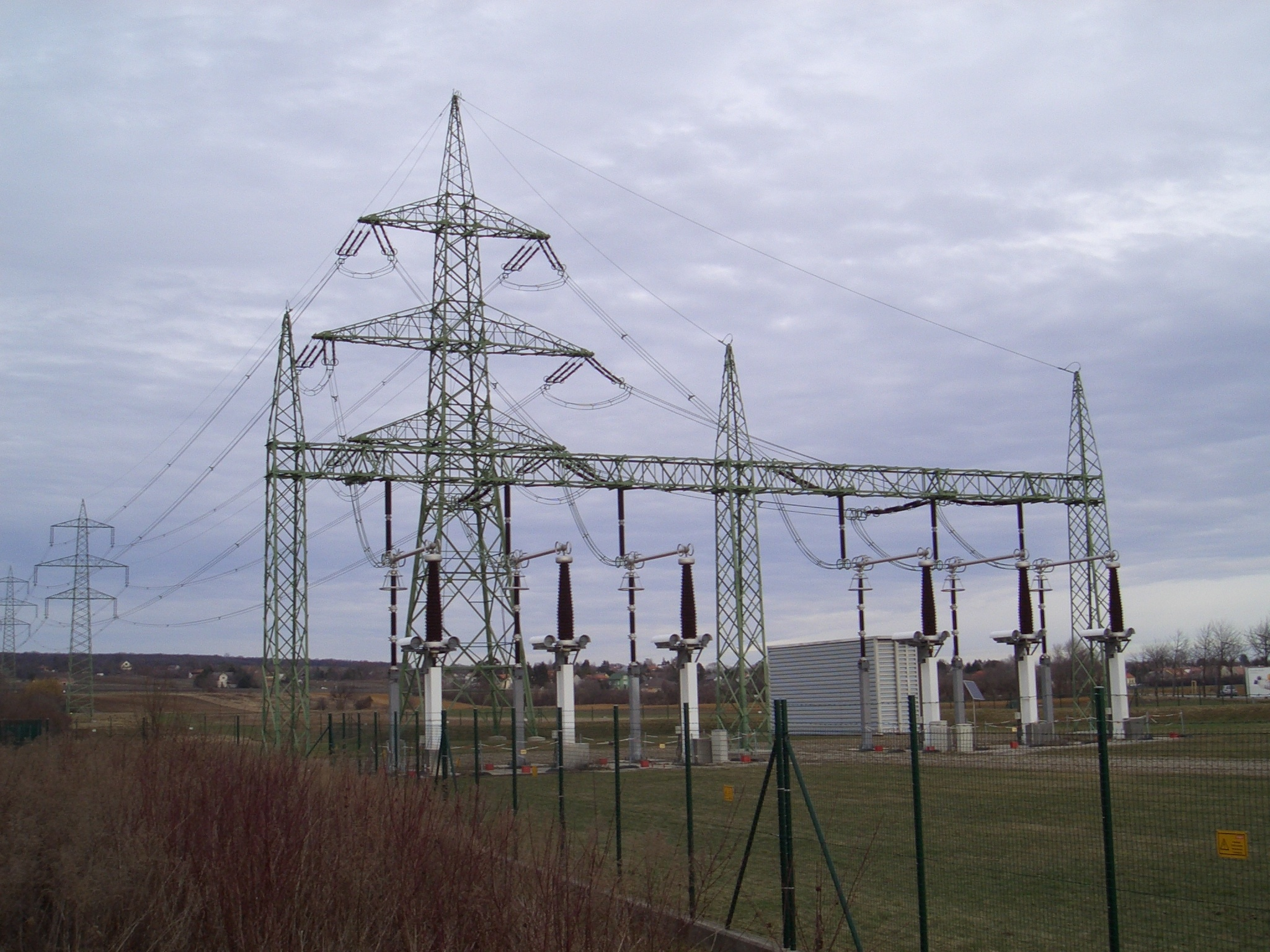 400-kV-Nordeinspeisung in Wien, Erdkabelstation